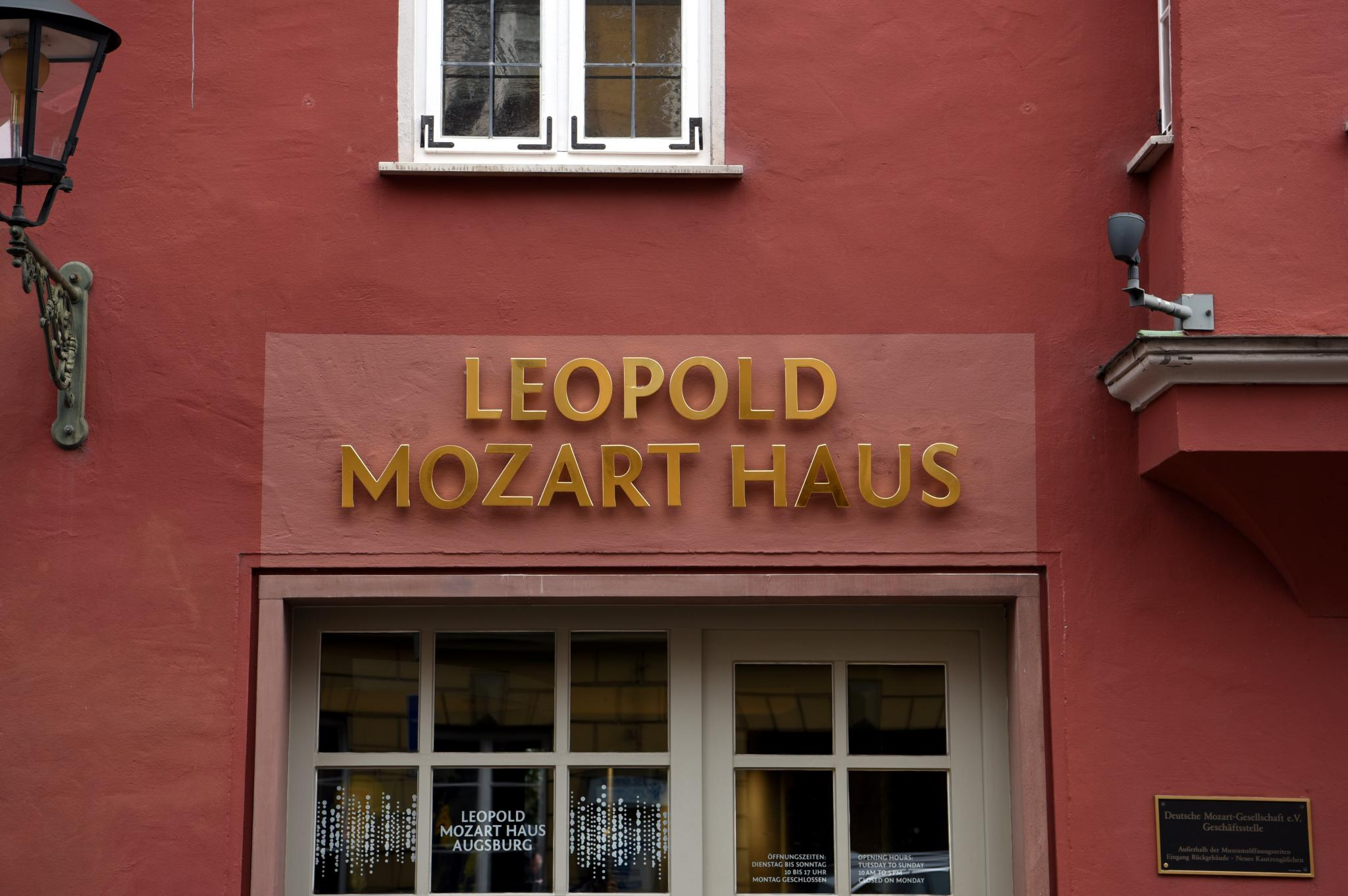 Fassade des Leopold-Mozart-Hauses